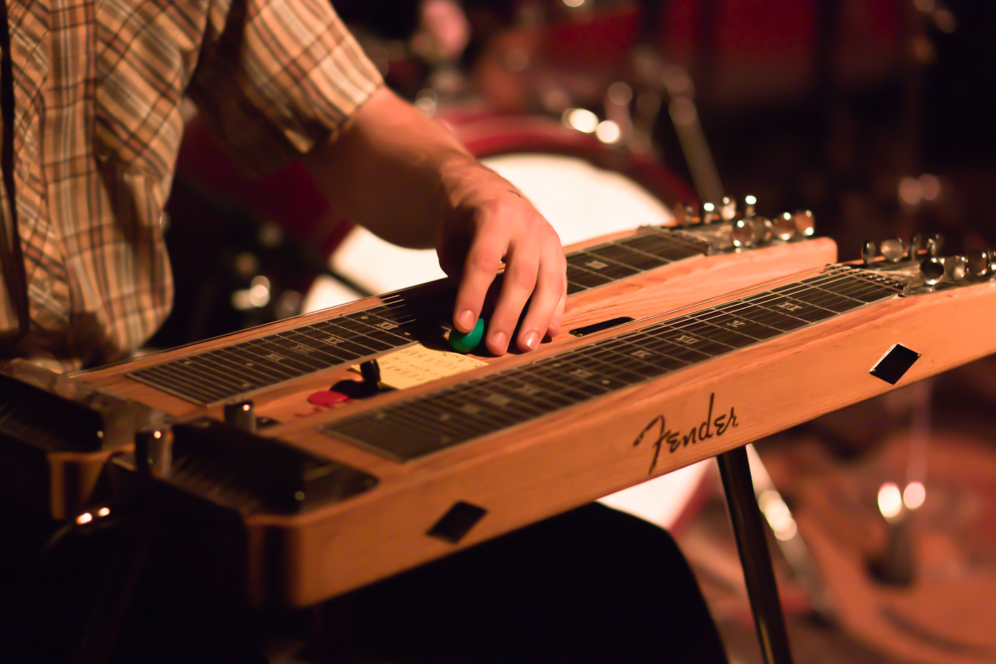 Fender Dual 8 Professional Lap Steel Guitar (ca.1952)